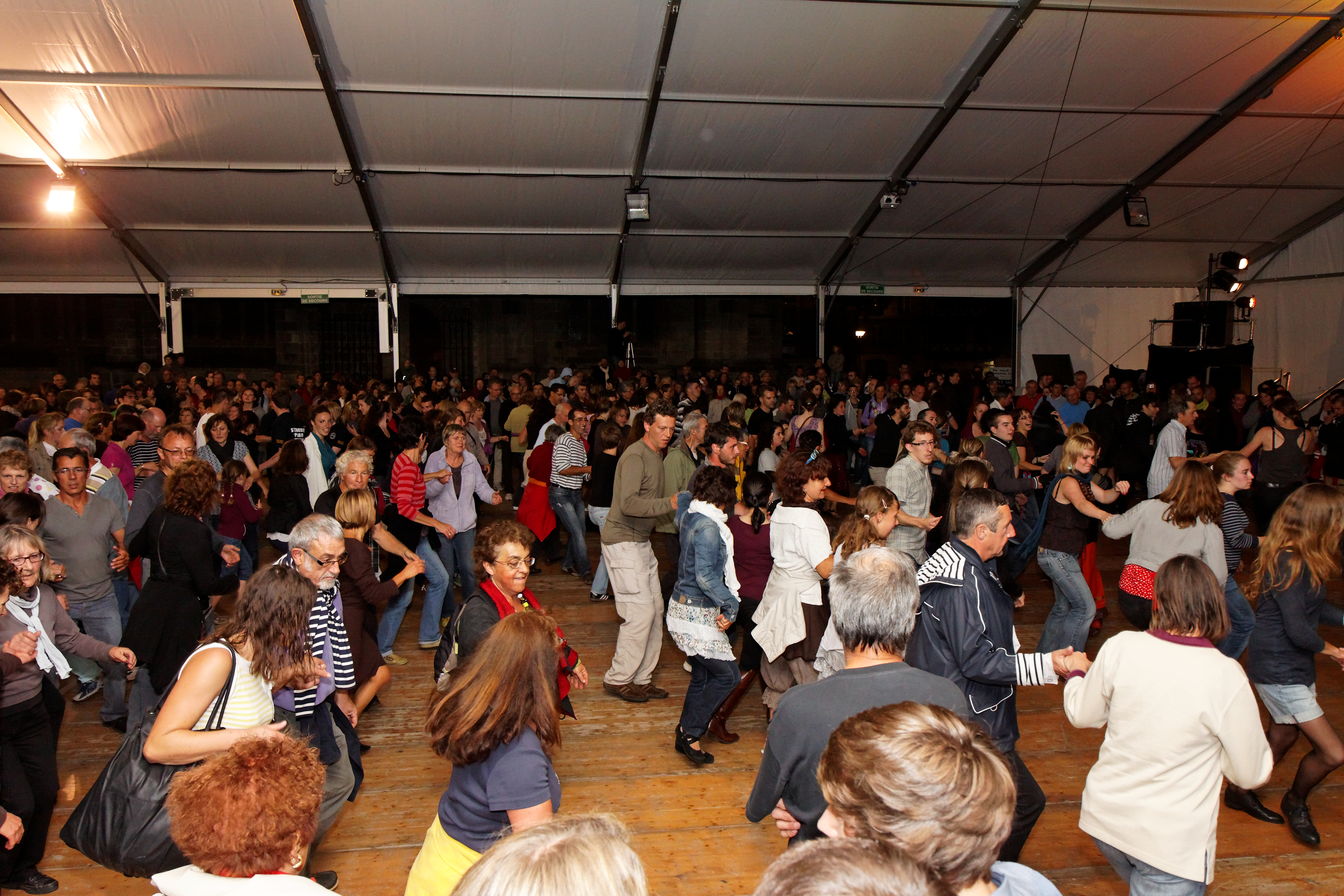 Fest-noz lors du festival de Cornouaille 2011.